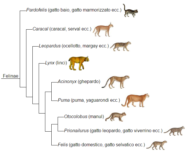 Phylogeny of felinae